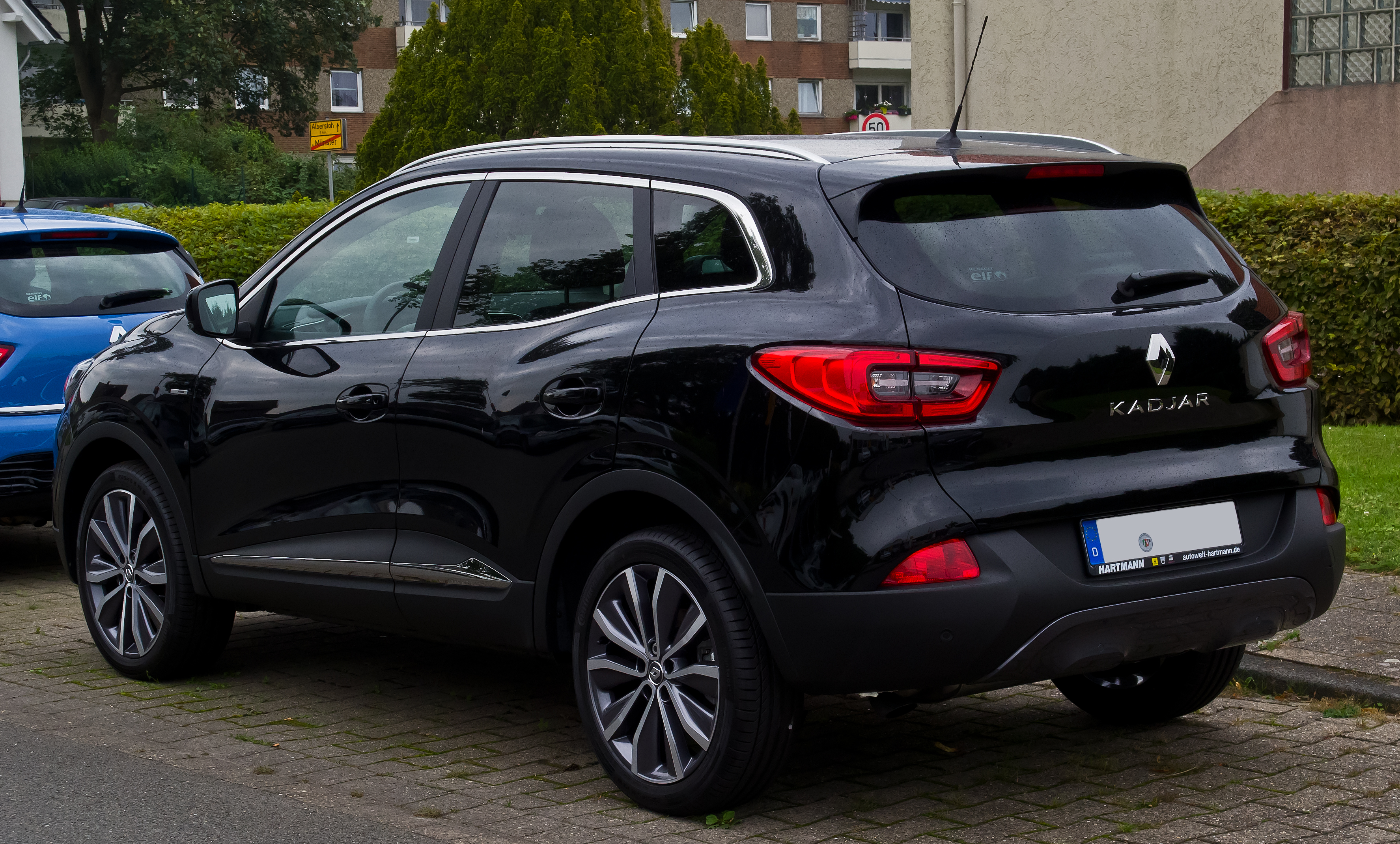 Renault Kadjar Bose Edition ENERGY dCi 130 4x4